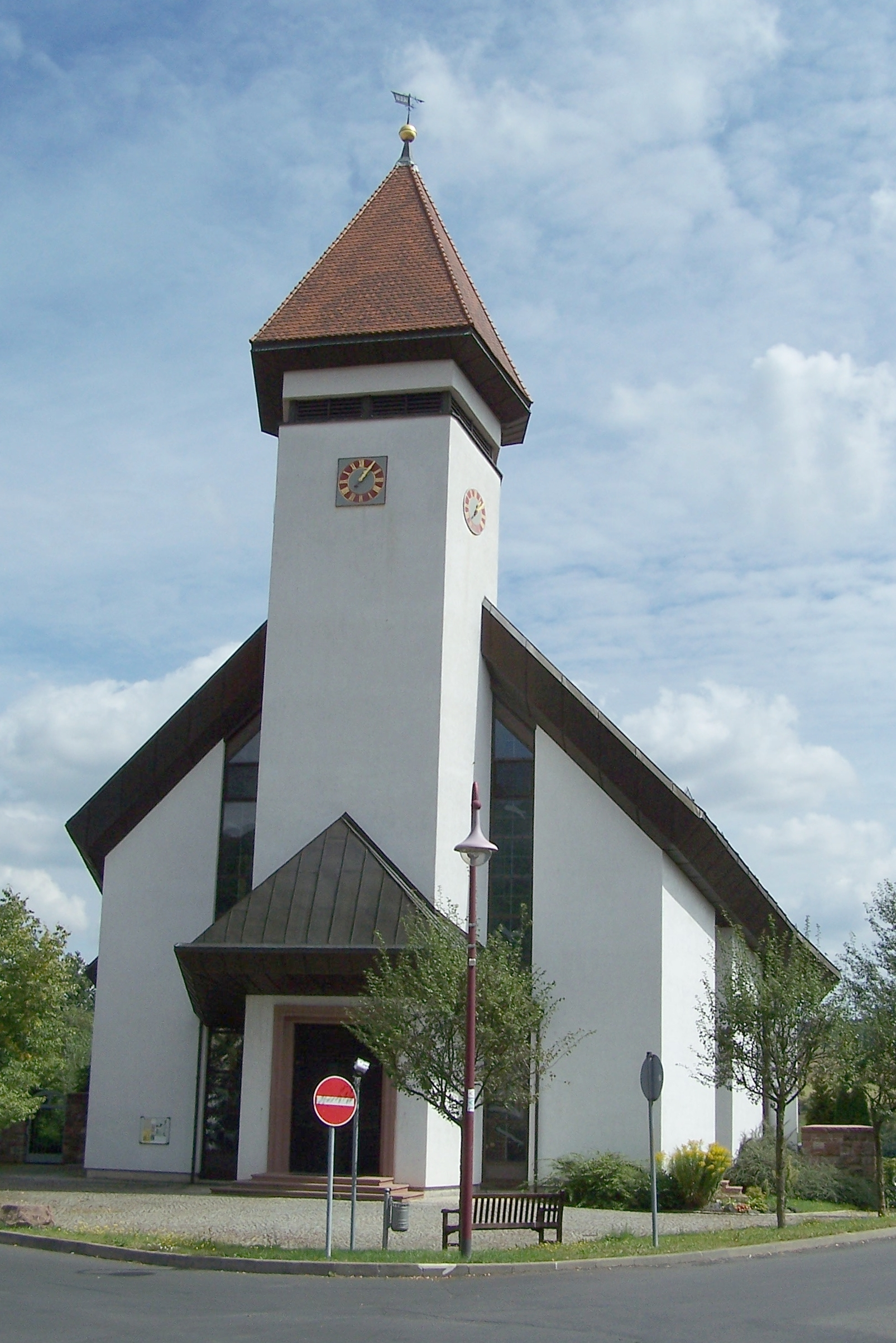 Ansichten und Details zur Michaeliskirche.